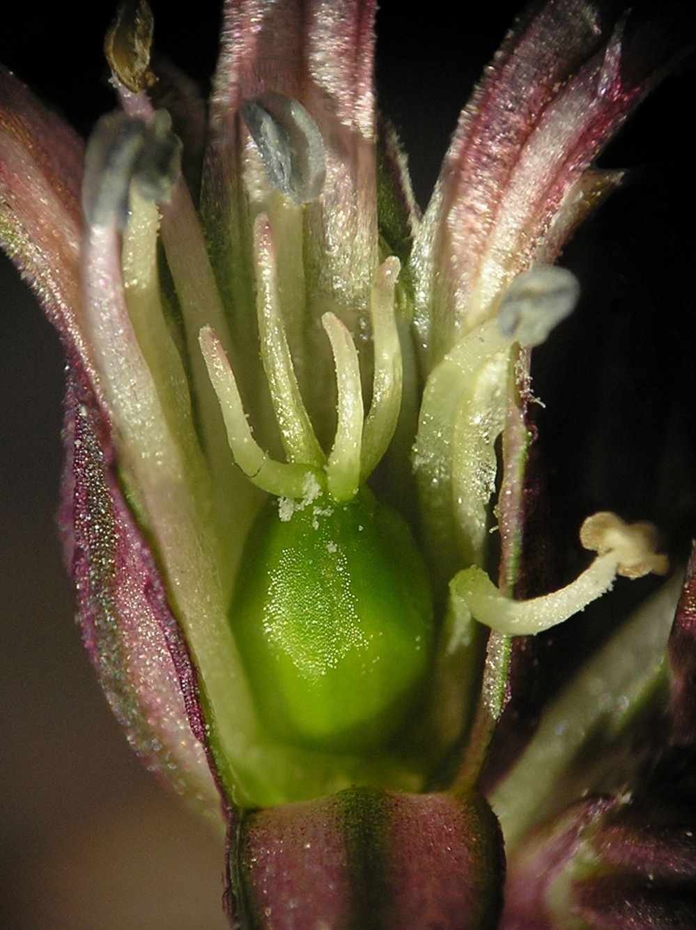 Lychnis flos-cuculi,Firletka poszarpana, Brok, Polska